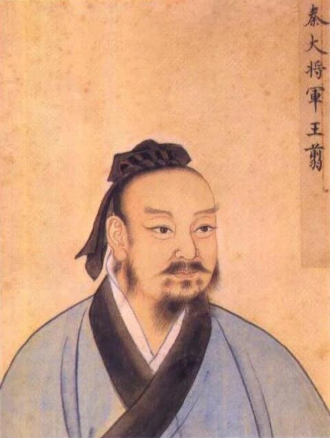 中文（中国大陆）: 秦大将军王翦